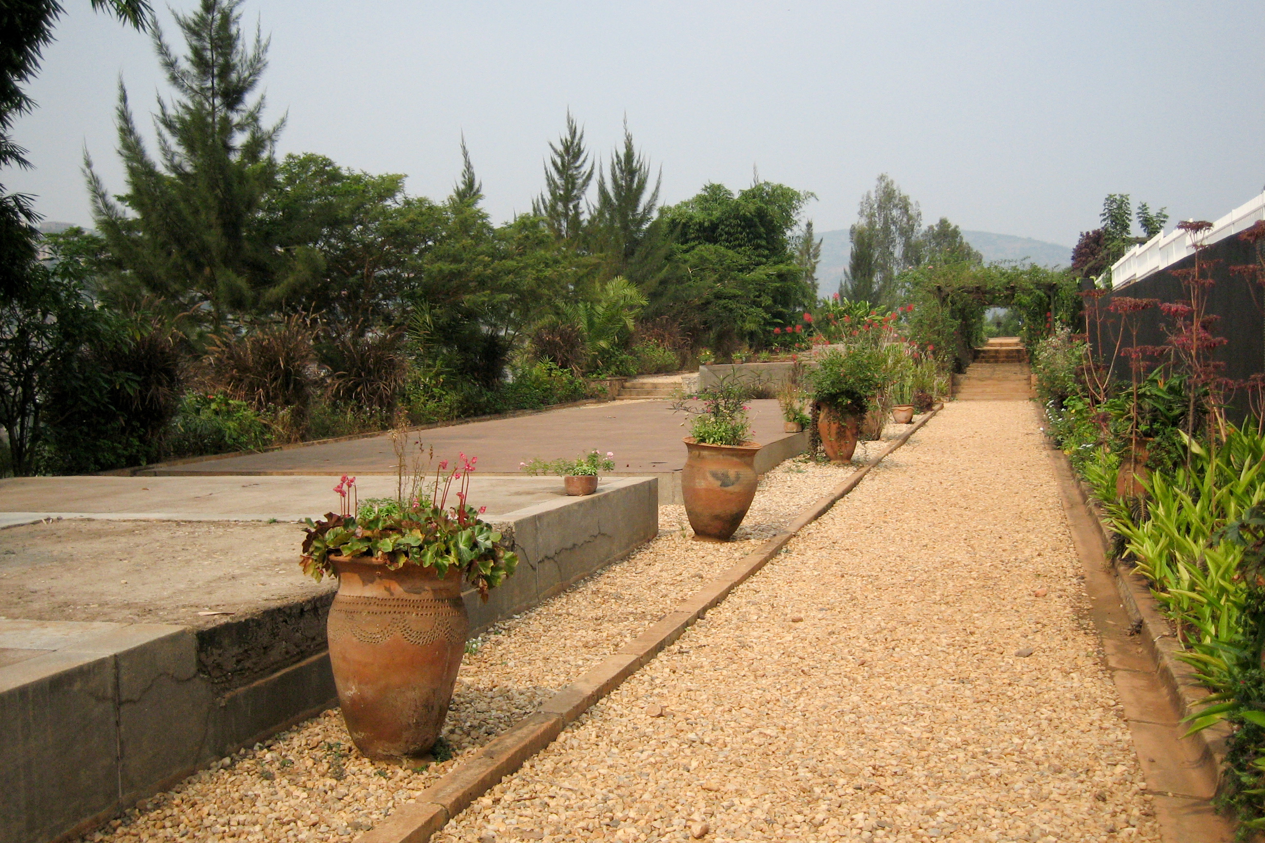 Mass graves. Kigali Memorial Centre, Gisozi.